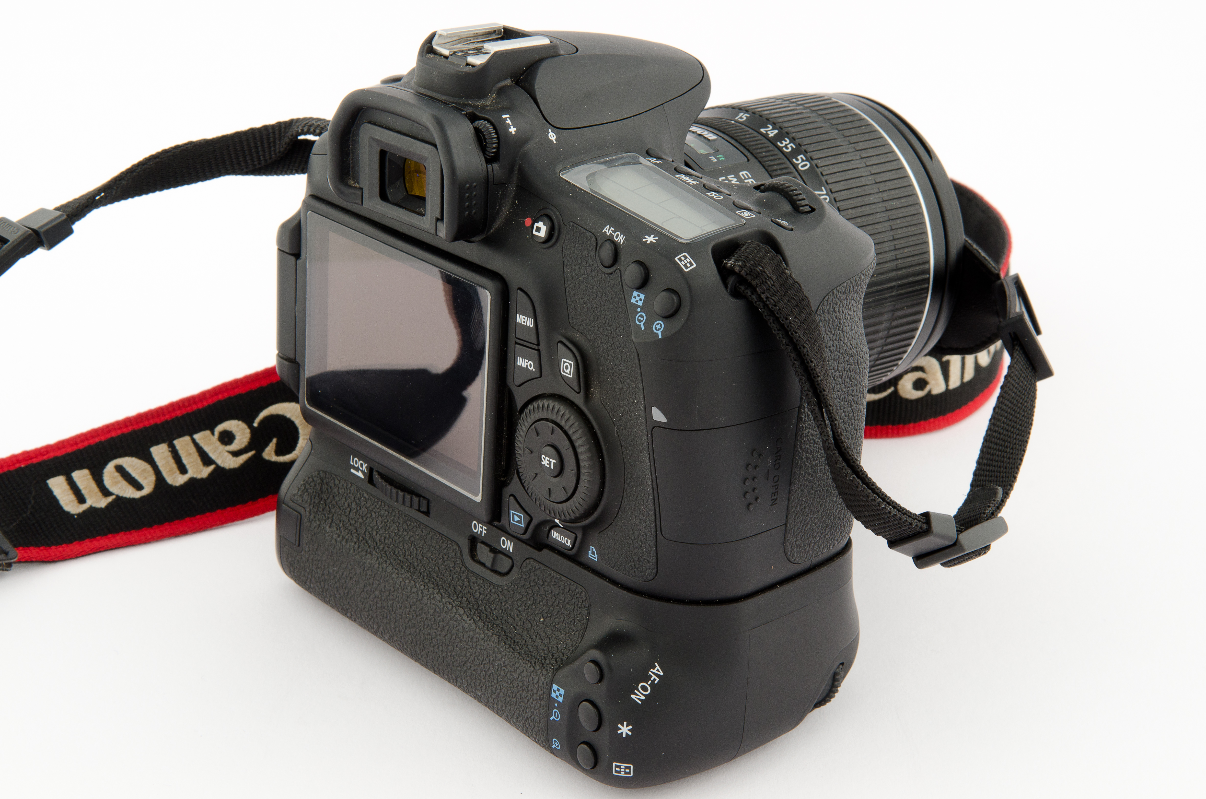 Spiegelreflexkamera Canon 60D